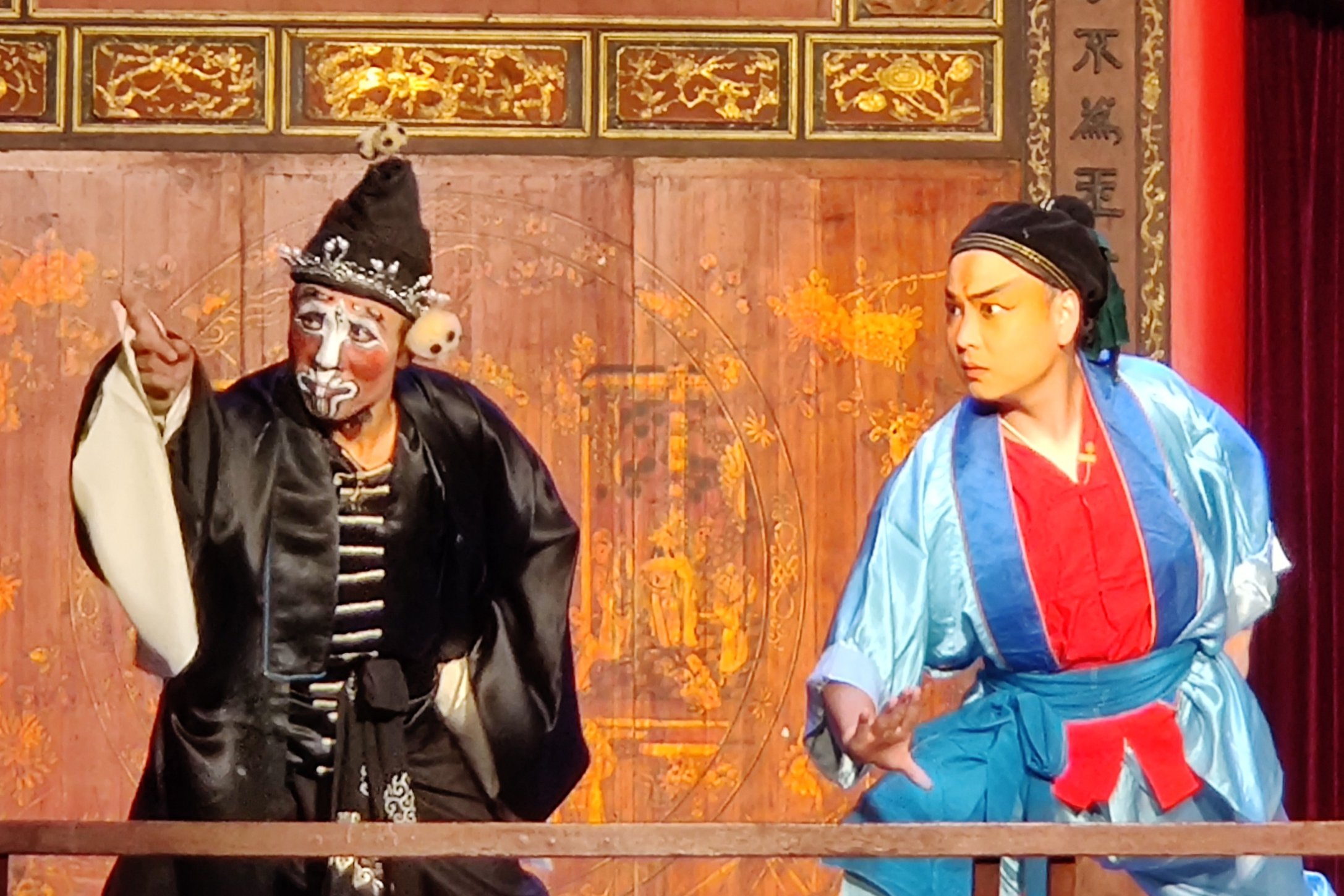 中文（中国大陆）: 时迁——焦艳明。賈哑——石志远